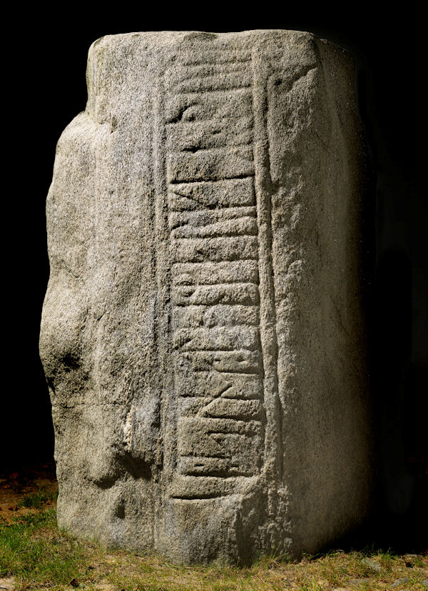 Foto af Roberto Fortuna 2012